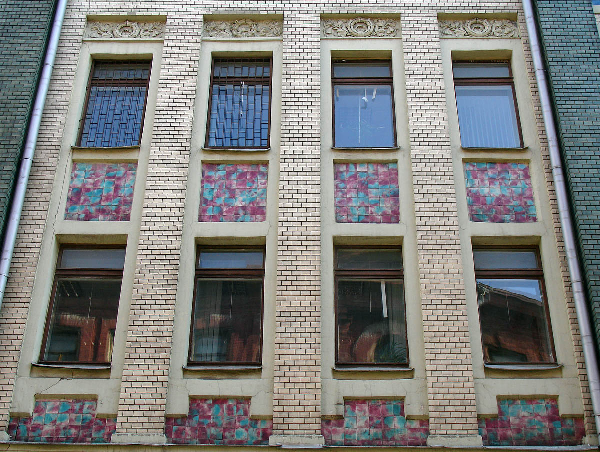 16, Pechatnikov Lane, Moscow